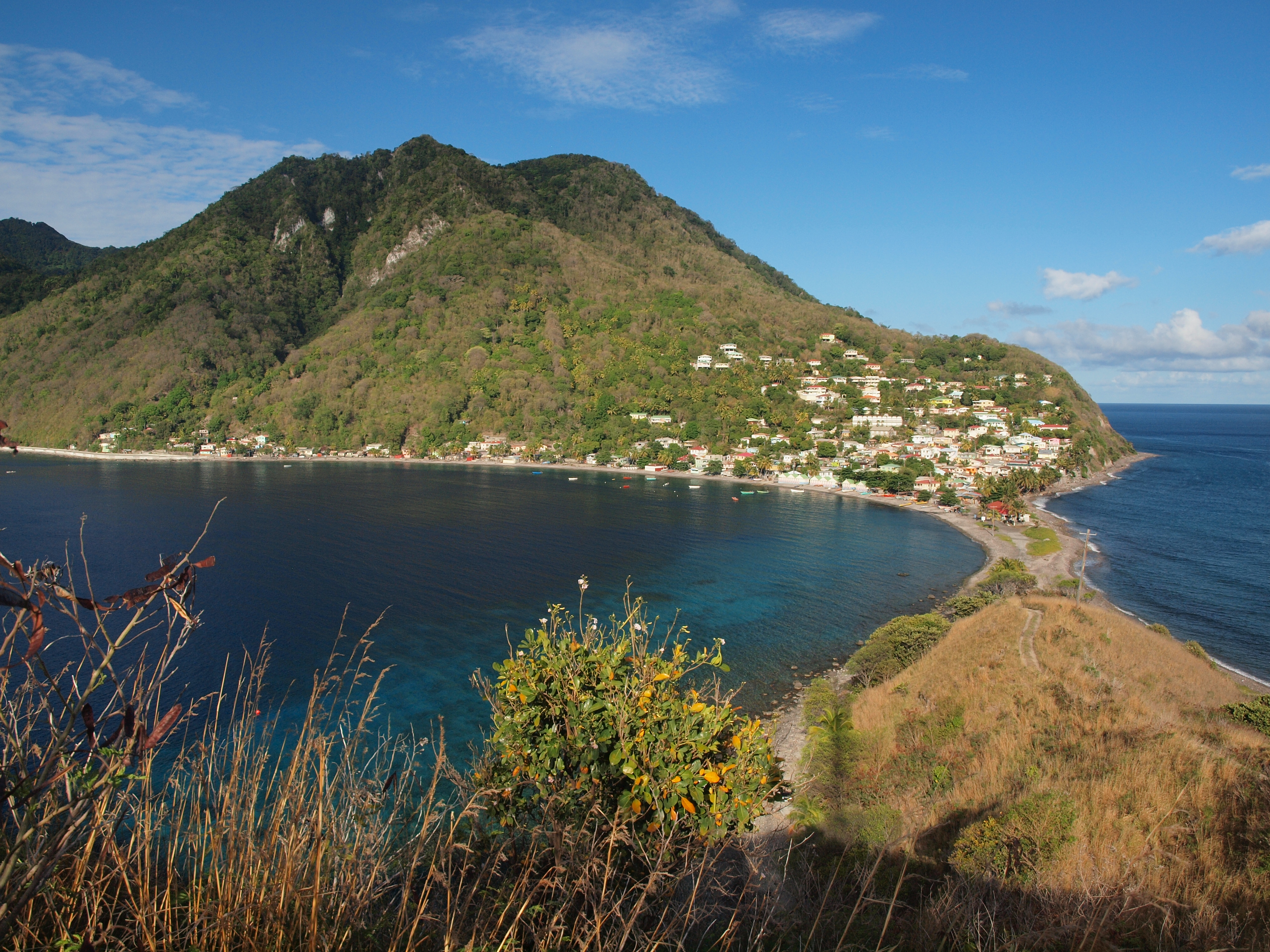 Scott's Head